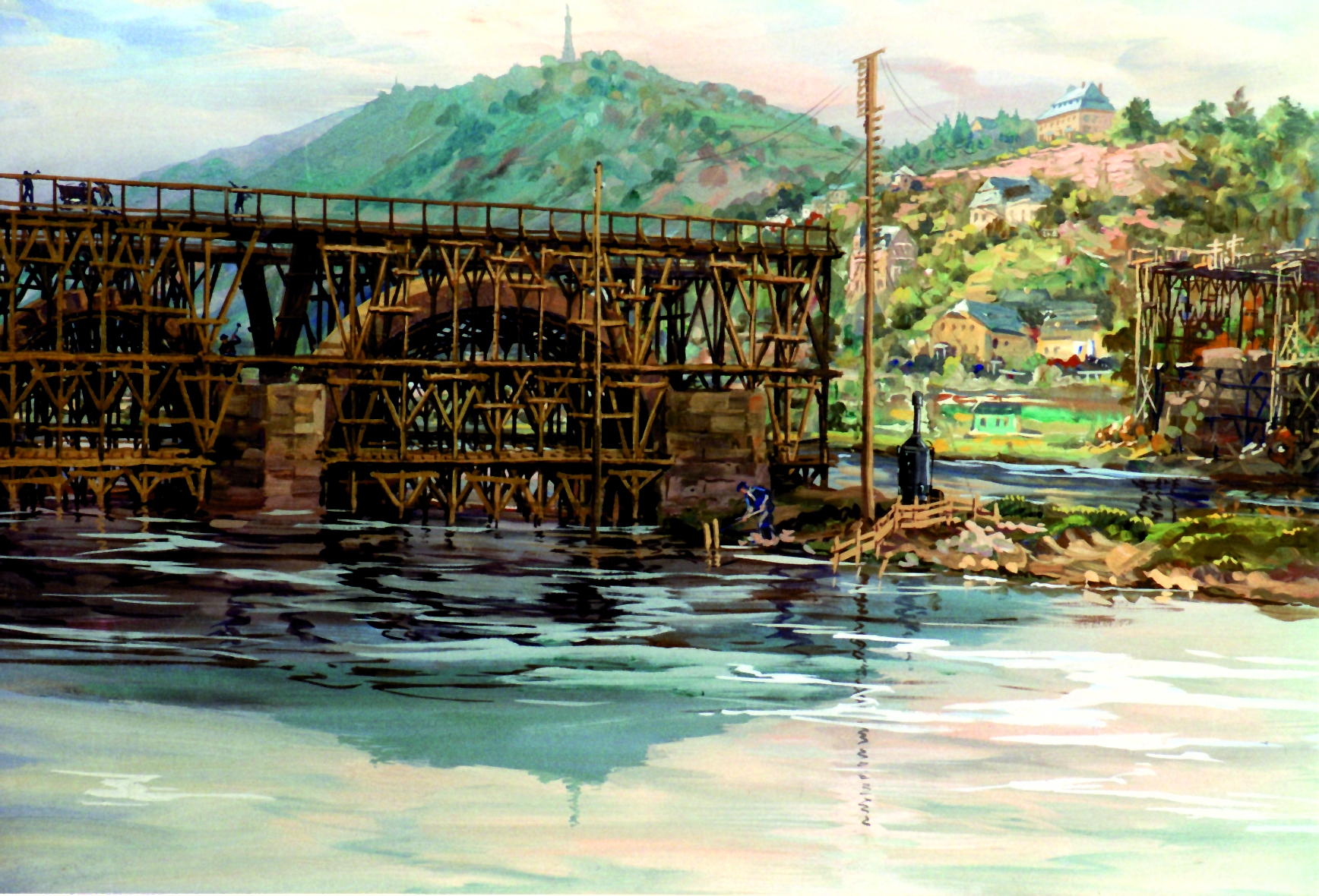 Anton Schneider-Postrum: Bau der Kaiser-Wilhelm-Brücke in Trier, 1912, Tempera auf Papier, 59,7 x 78,8 cm, Stadtmuseum Simeonstift Trier, Inv. Nr. III 124.